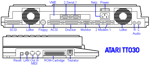 Anschlüsse des Atari TT Computers